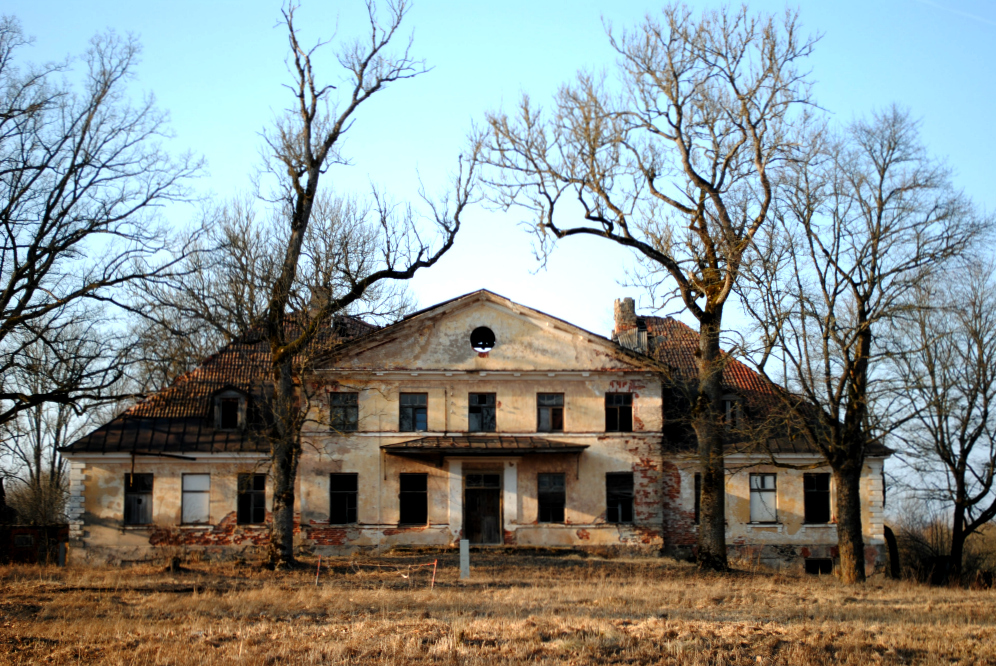 Jaunraunas muiža.